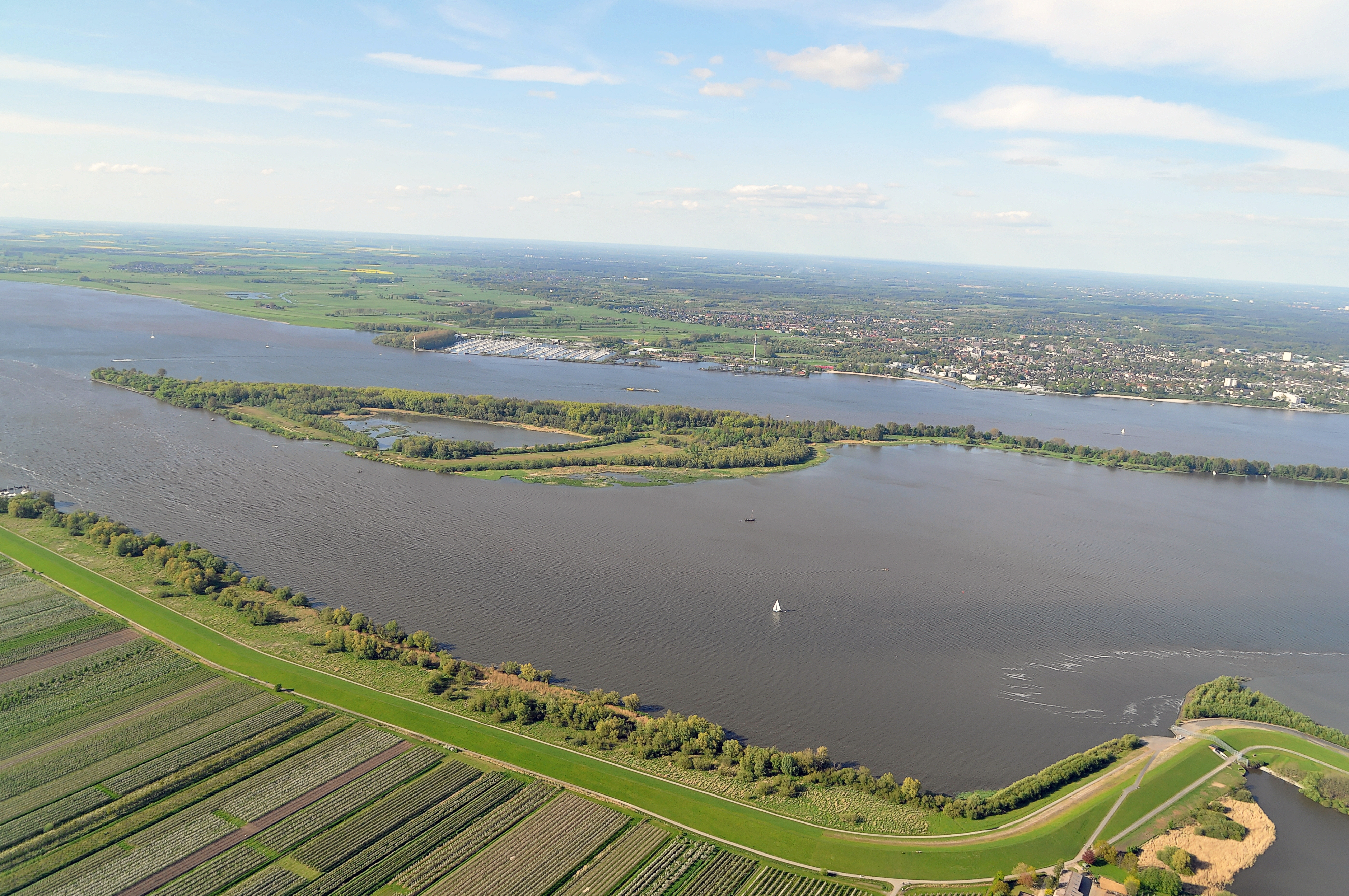 Luftbilder von der Nordseeküste 2012-05